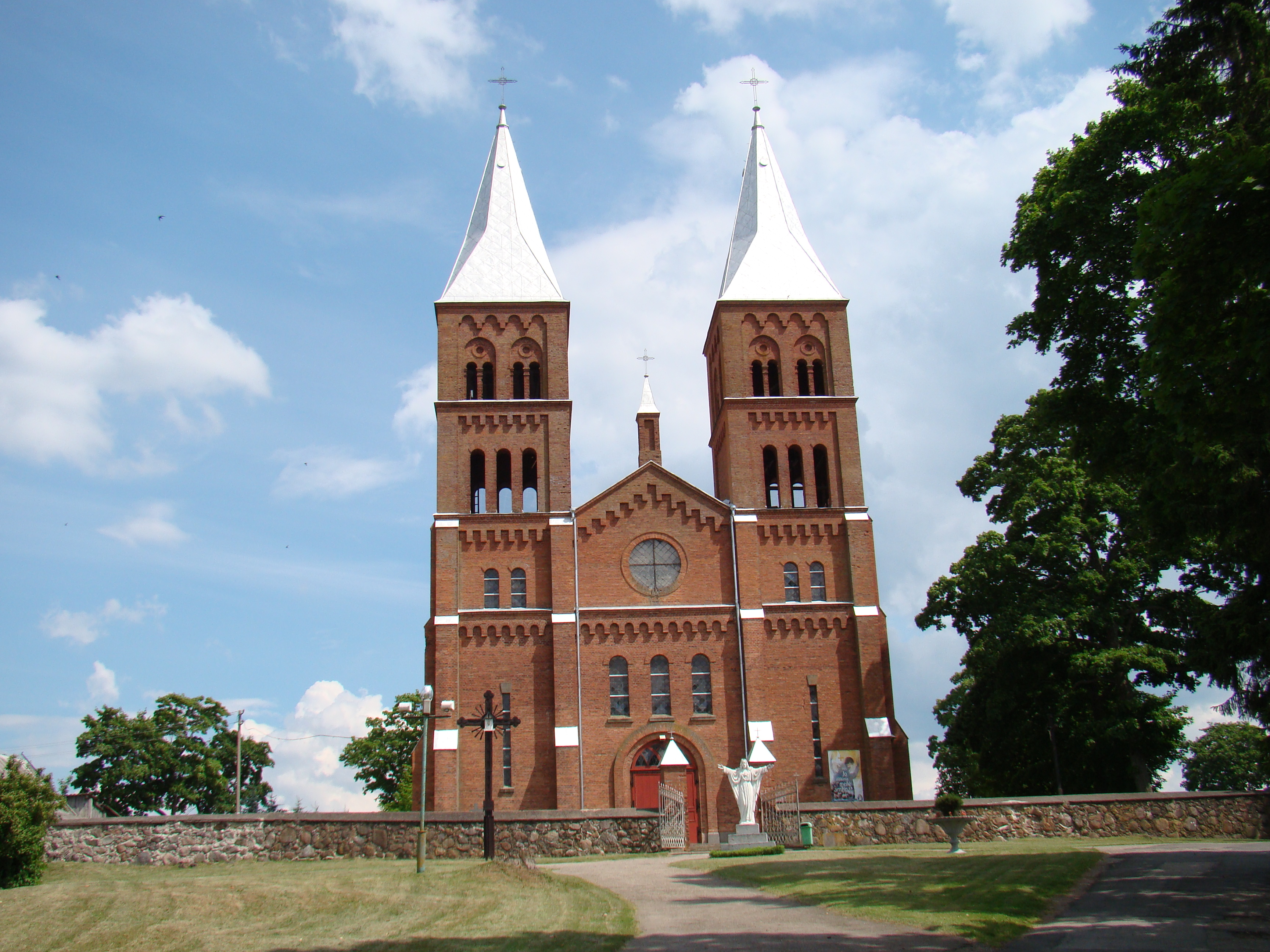 Balninkų Šv. vyskupo Stanislovo bažnyčia, Molėtų rajonas